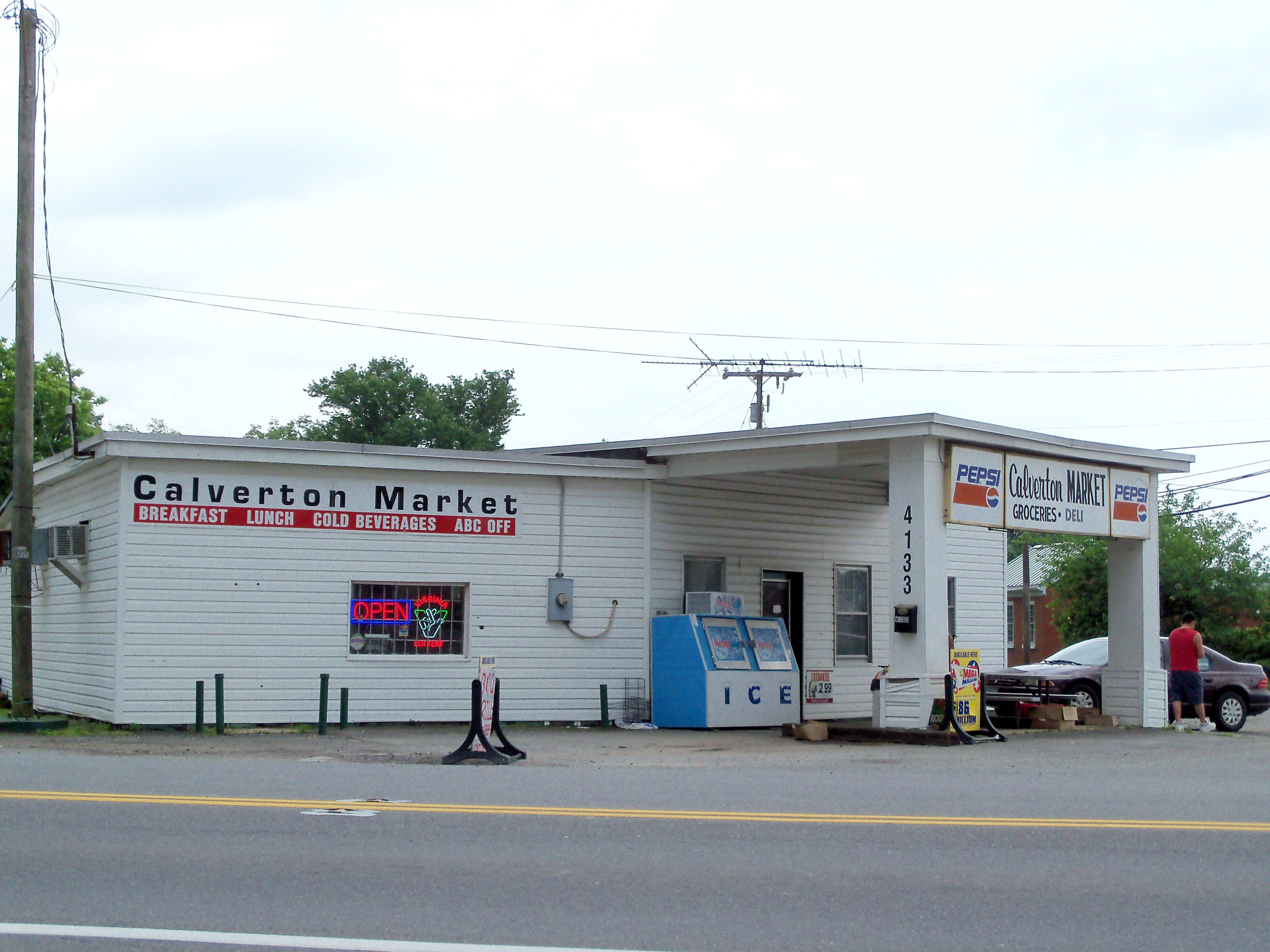 Calverton Market